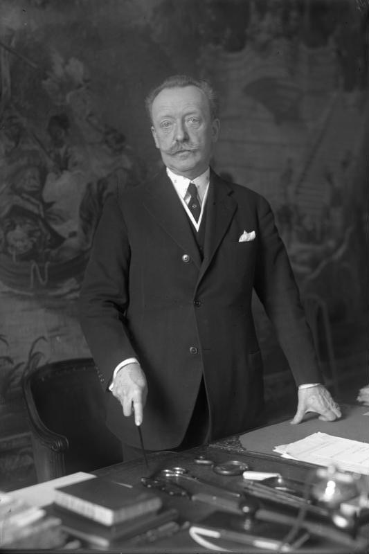 Wie der Reichspräsident von Hindenburg die ausländischen Diplomaten zum Jahreswechsel empfängt ! Der französische Botschafter in Berlin Margérie, der Sprecher des Diplomatischen Corps während des Neujahrsempfanges beim Reichspräsidenten von Hindenburg.